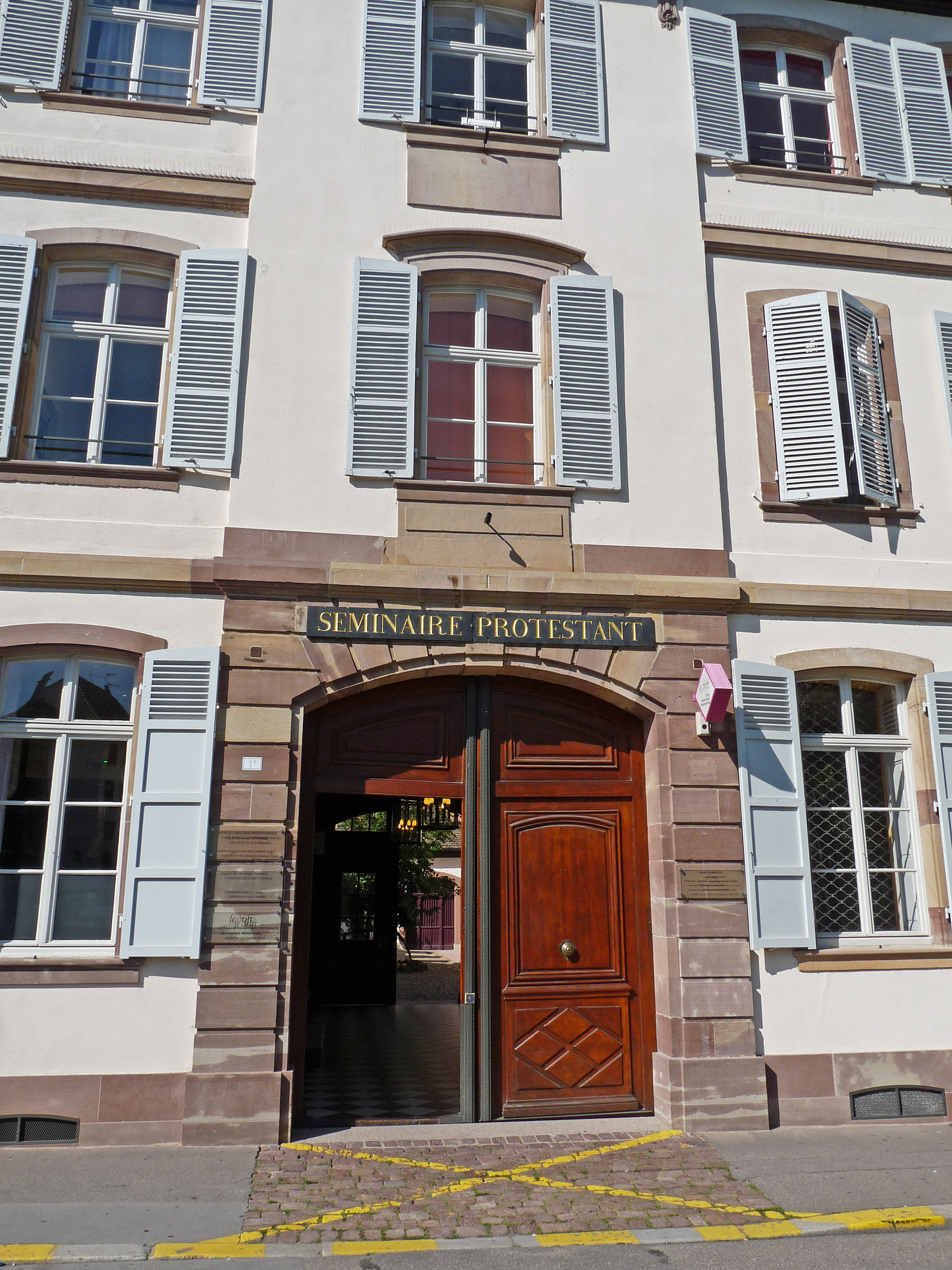 Strasbourg : entrée du Stift ou ancien Séminaire protestant, aujourd'hui foyer et restaurant universitaire. 1bis, quai Saint-Thomas.